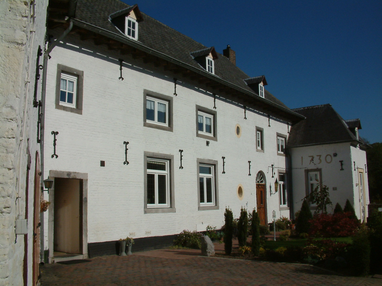 Kasteel St. Jans-Geleen